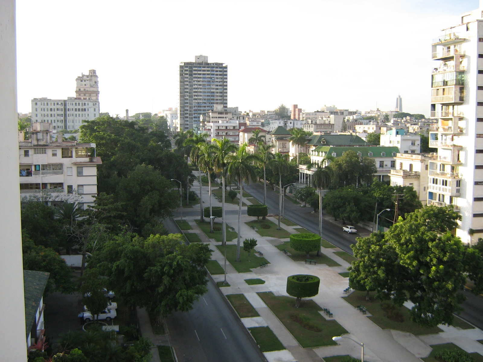 Avenida de los presidentes y calle 21, desde mi balcon, en la barriada del Vedado, La Habana